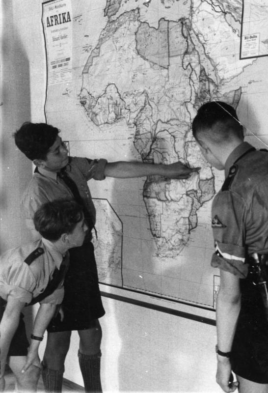 a) Die Hitlerjugend interessiert sich für unsere Kolonien